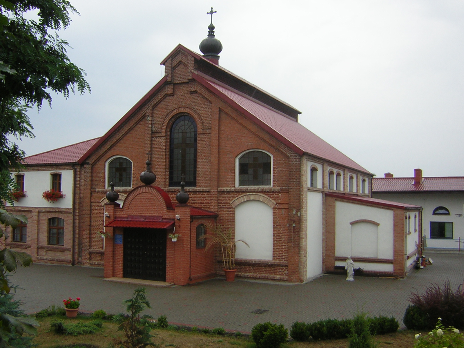 Cerkiew Bizantyjsko-Ukraińska w Iławie